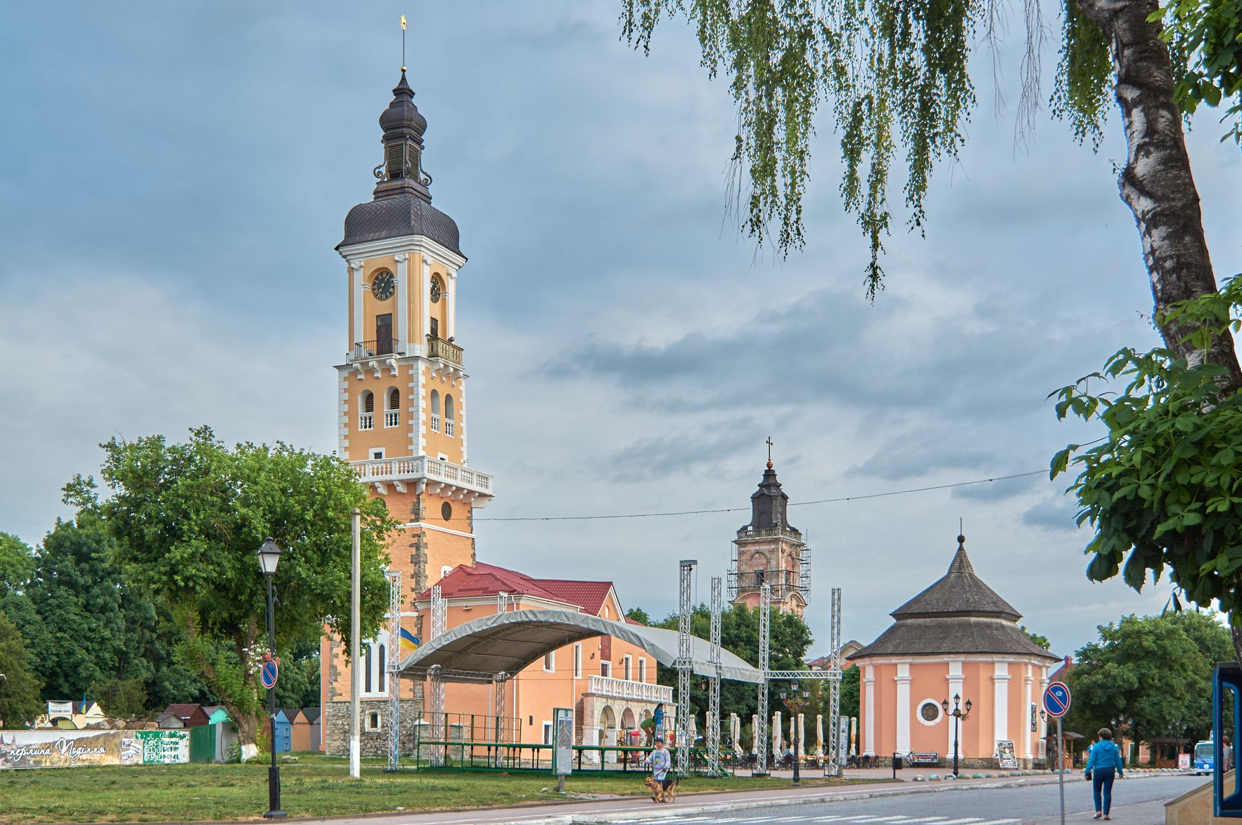 Будинок Польського магістрату, Кам'янець-Подільський, м-н Польський Ринок, 1